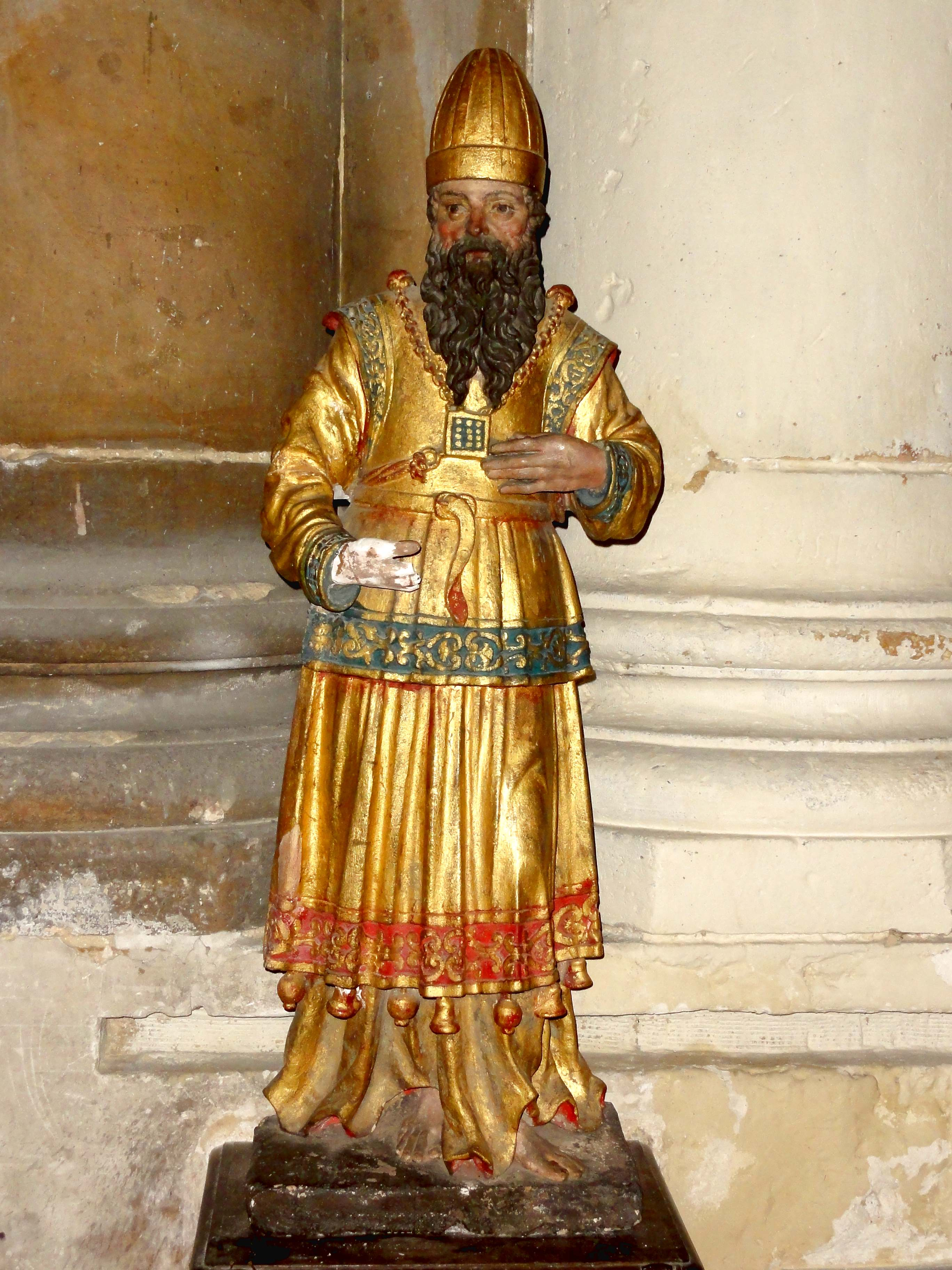 Mobilier de l'église - voir titre.